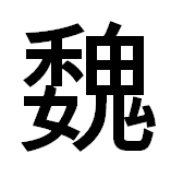 Description иеорглиф ВэйSource Файл:Wei-Hieroglyph-1.PNGAuthor Участник:ВМНС иеорглиф Вэй